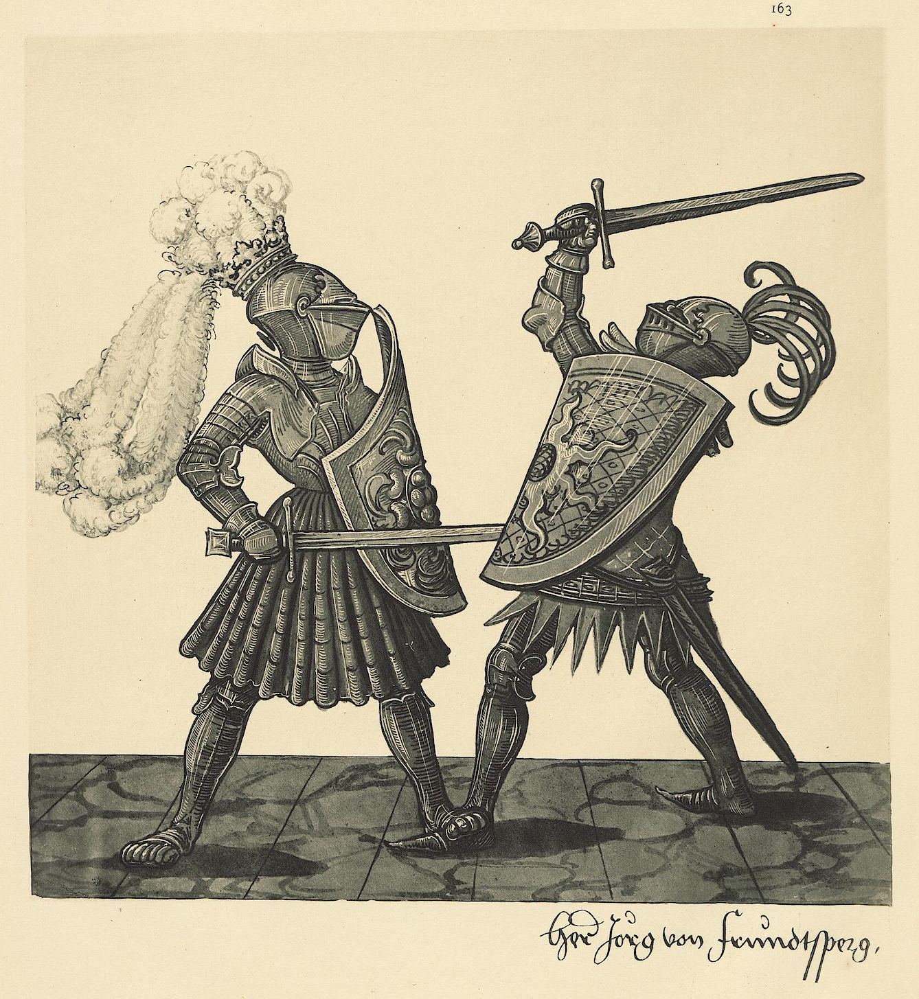 Tafel aus: Freydal: des Kaisers Maximilian I. Turniere und Mummereien; mit einer geschichtl. Einleitung. Tafeln. Wien, 1882. Exemplar der UB Tübingen. (Faksimileedition des Turnierbuchs Freydal, Kunsthistorisches Museum Wien, Signatur: K.K. 5073) Tafel 163 Herr Jorg von Frundtsperg